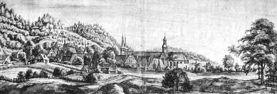 Gdańsk Oliwa. Oliwski klasztor około 1660 roku.